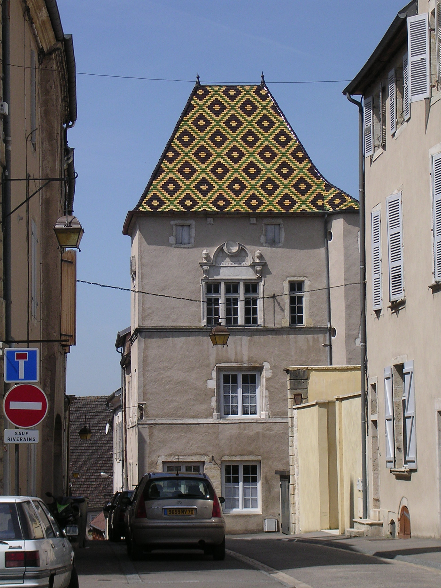 Gray (Haute-Saône). Maison 12, rue des Terreaux à Gray (Haute Saône). Construite en 1566 pour Jean Gauthiot d’Ancier. On y lit gravée à un fronton la devise des seigneurs d'Ancier : Spes mea Deus, (Dieu est mon espérance)